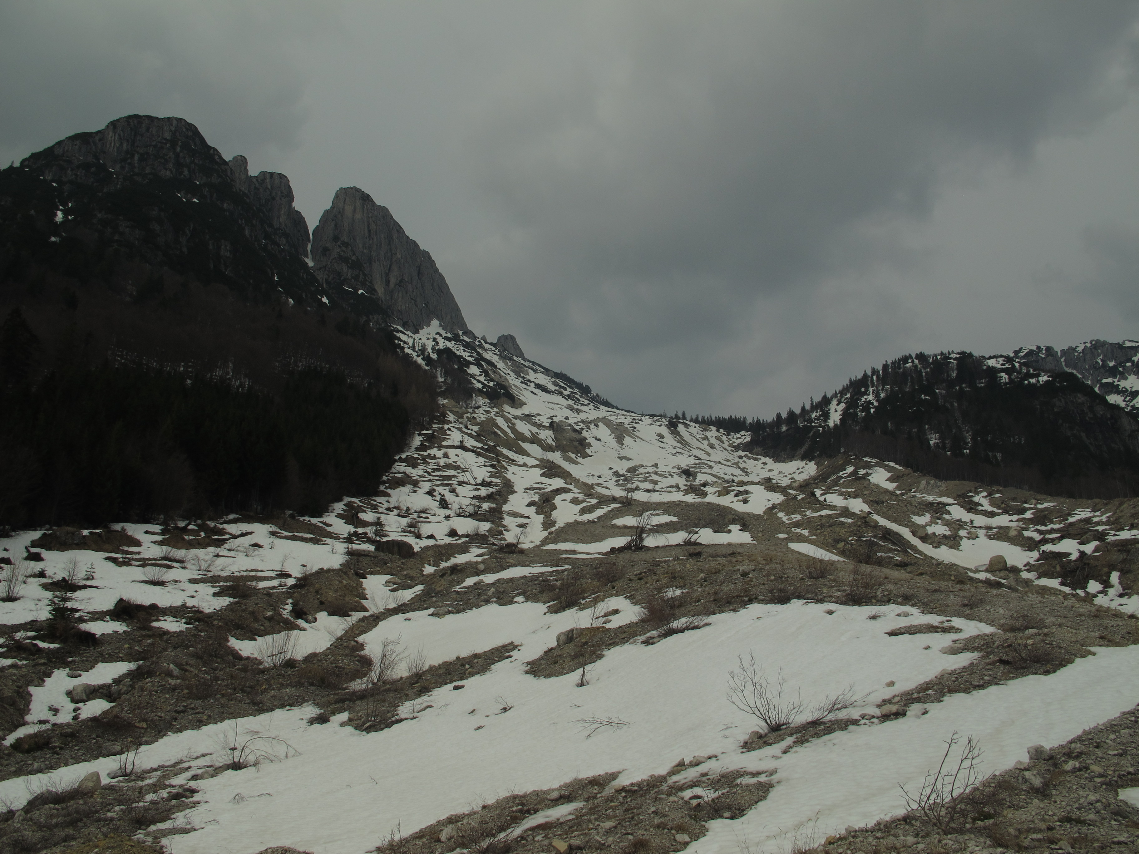 Zdrojová oblast velké mury, která zasáhla Log pod Mangartem v listopadu 2000